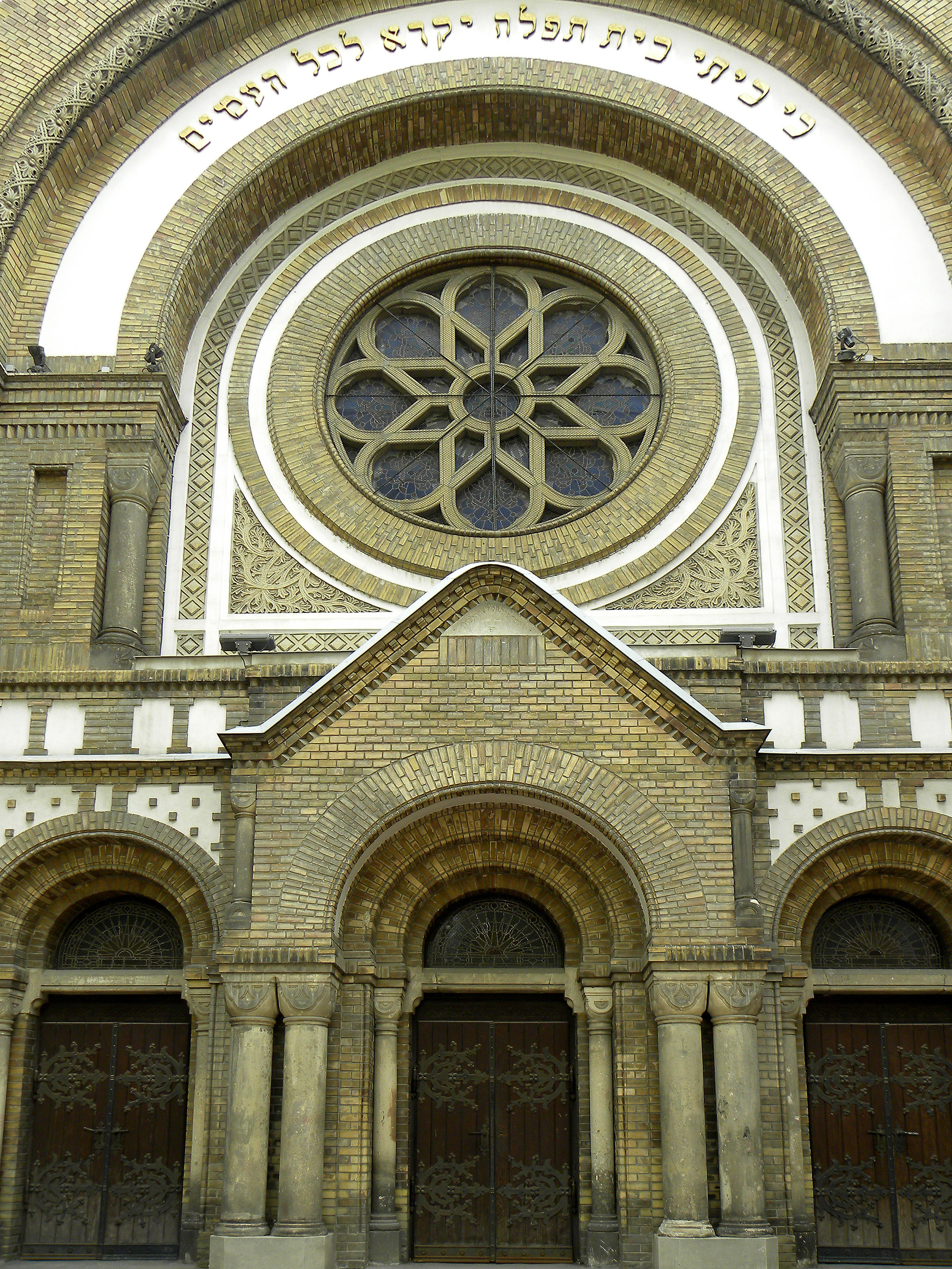 Novi Sad Sinagoga